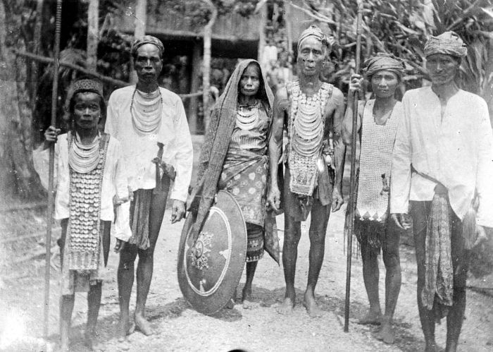 Repronegatief. Een groep Dajaks in feestkleding te Pangkalanboeoen, Beneden Doesoenlanden, Borneo